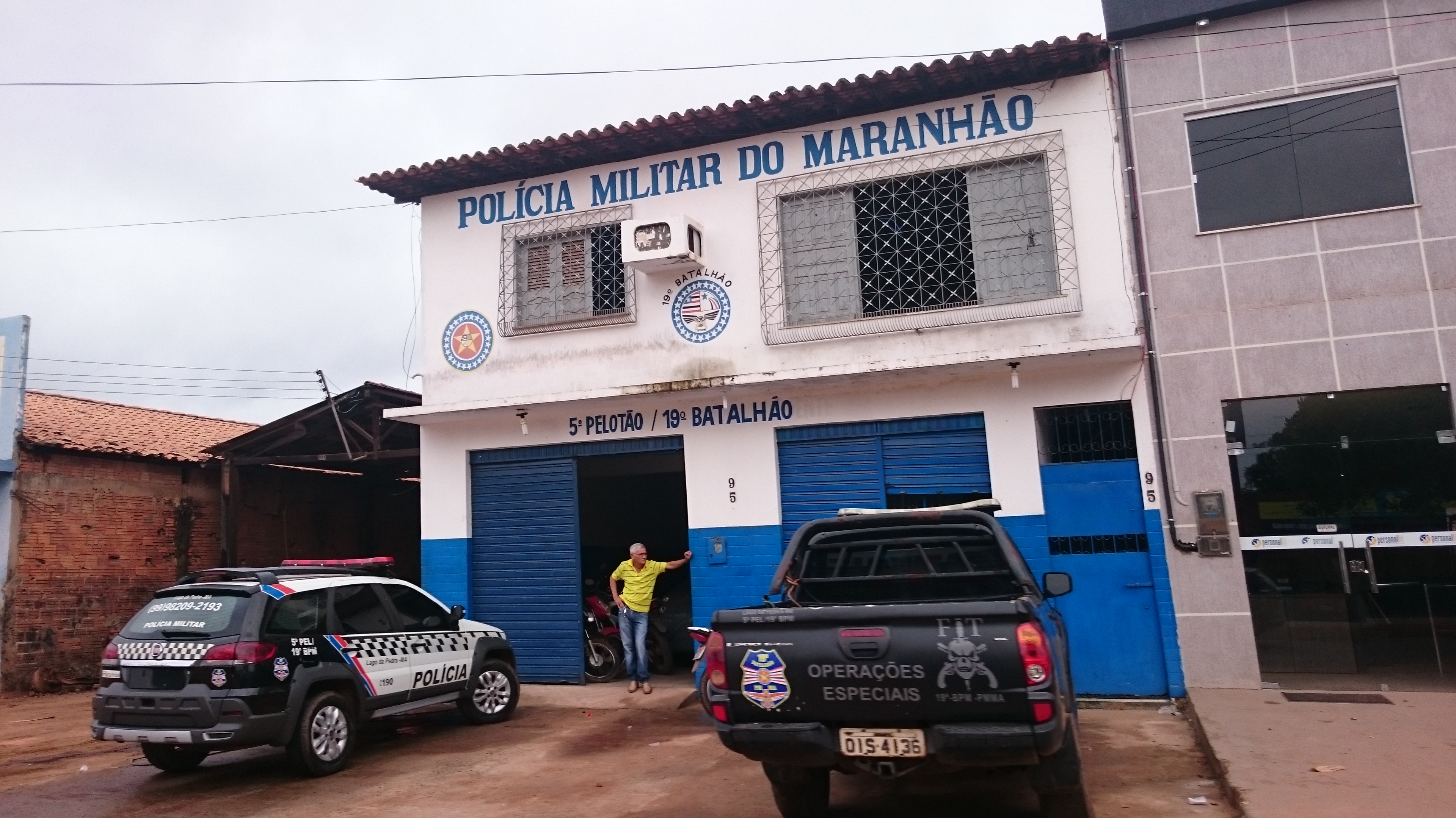 Quartel da PMMA